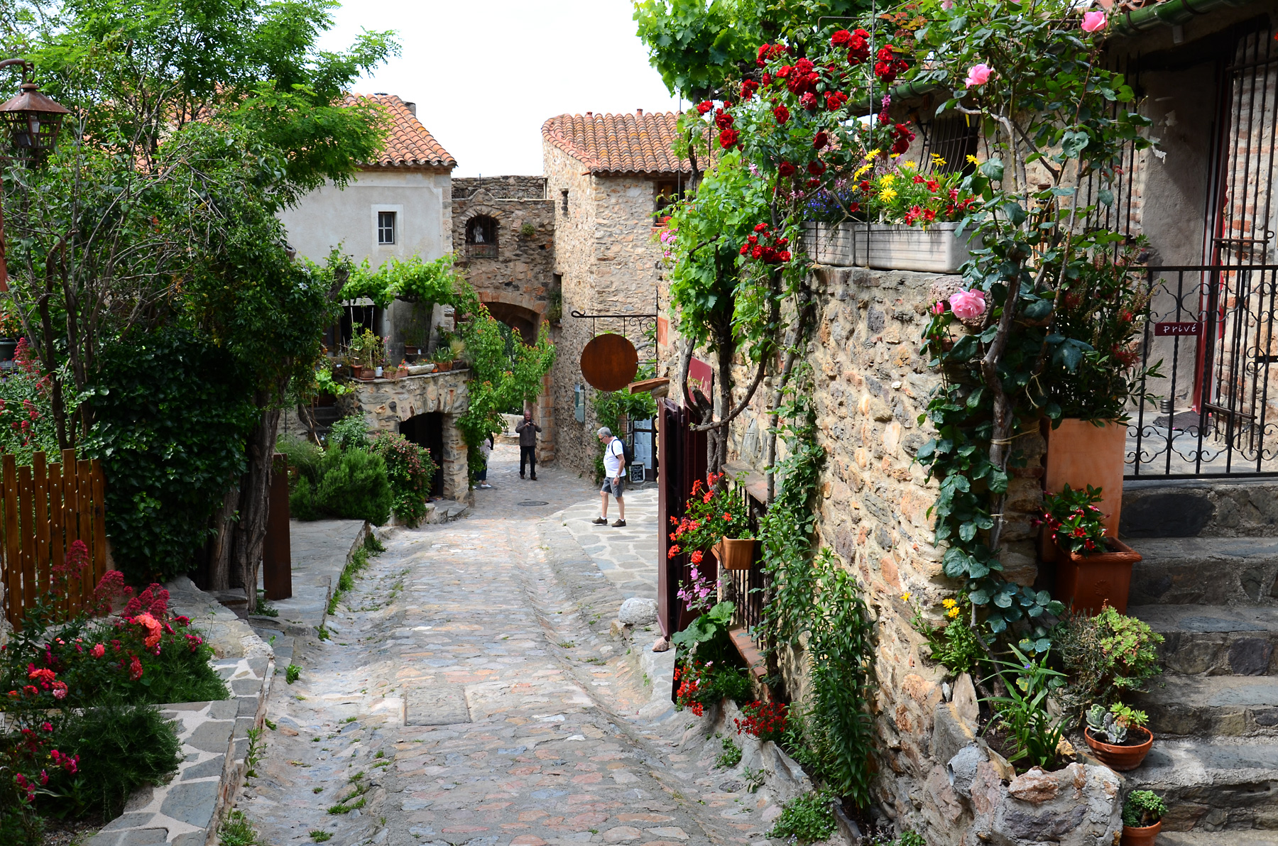 Castelnou (Les Plus Beaux Villages de France)